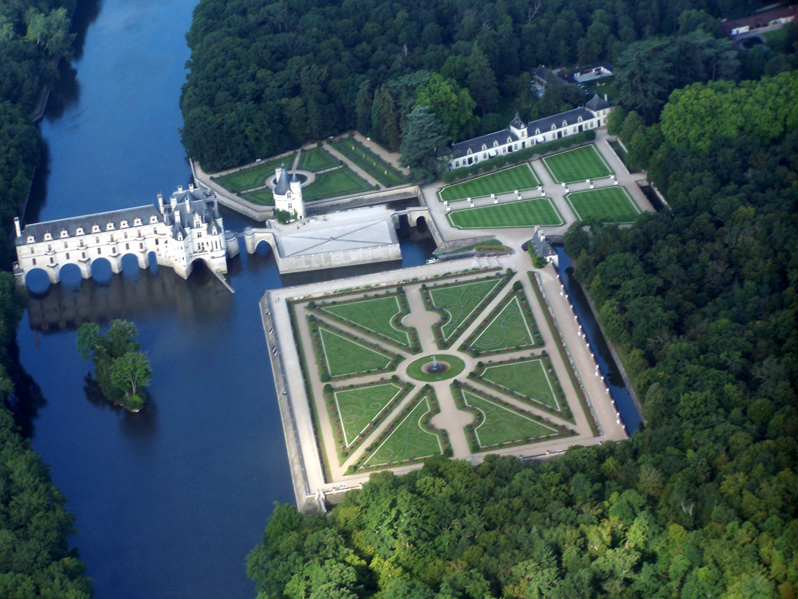 Le chateau et ses jardins.